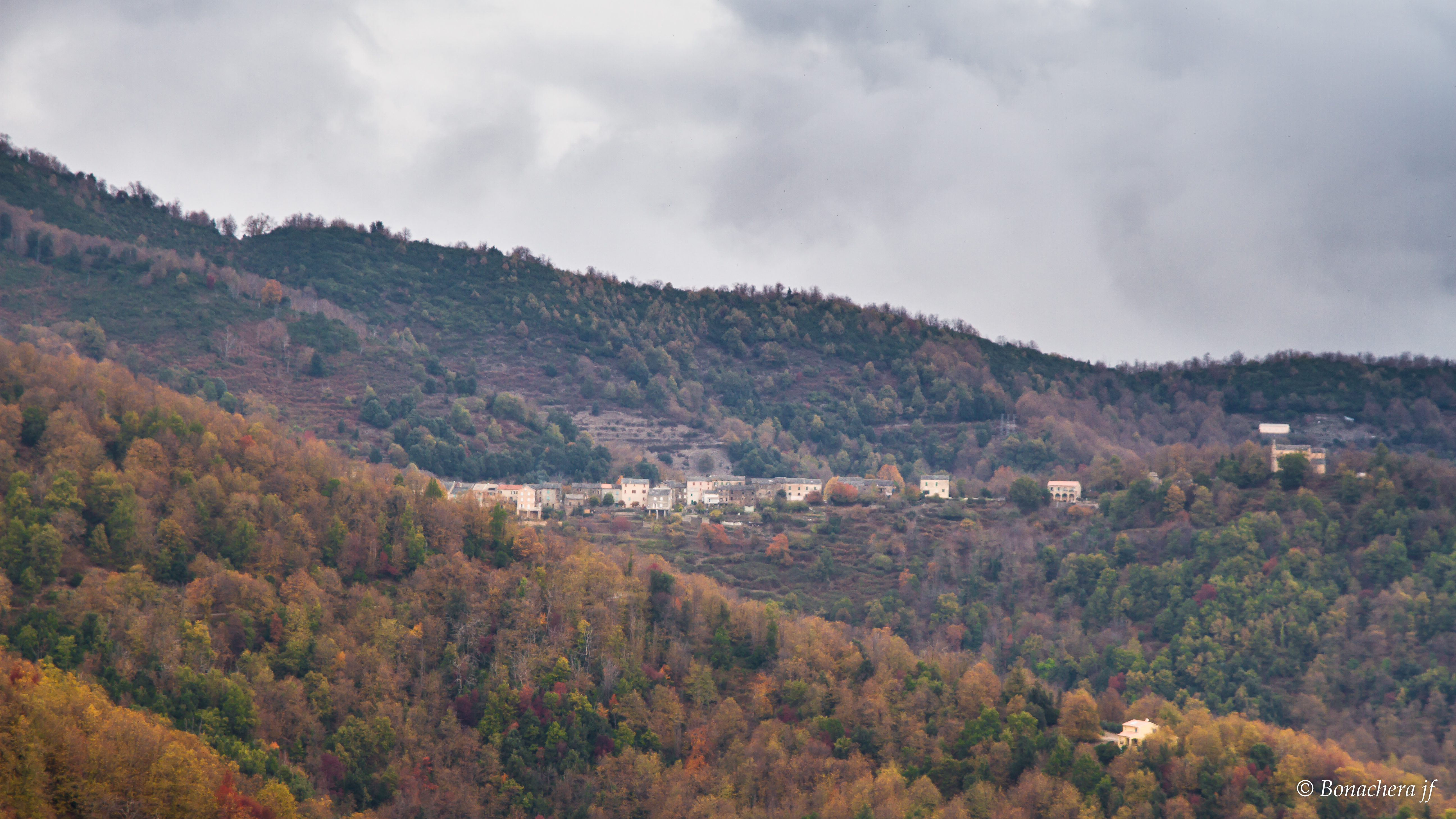 U paese di U Gjhucatoghju (Giocatojo)